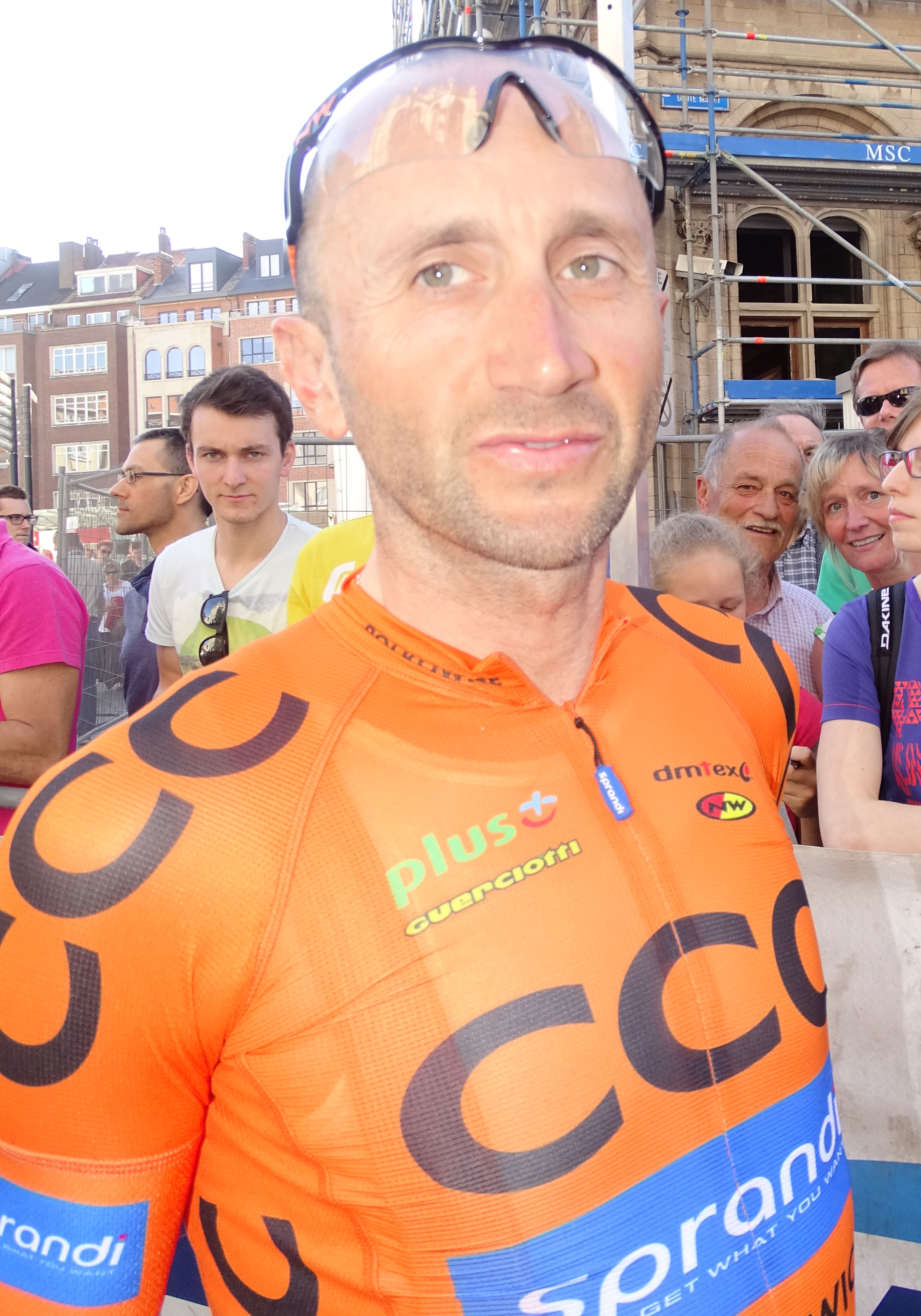 Reportage réalisé le mercredi 15 avril à l'occasion du départ de la Flèche brabançonne 2015 à Louvain, Belgique.